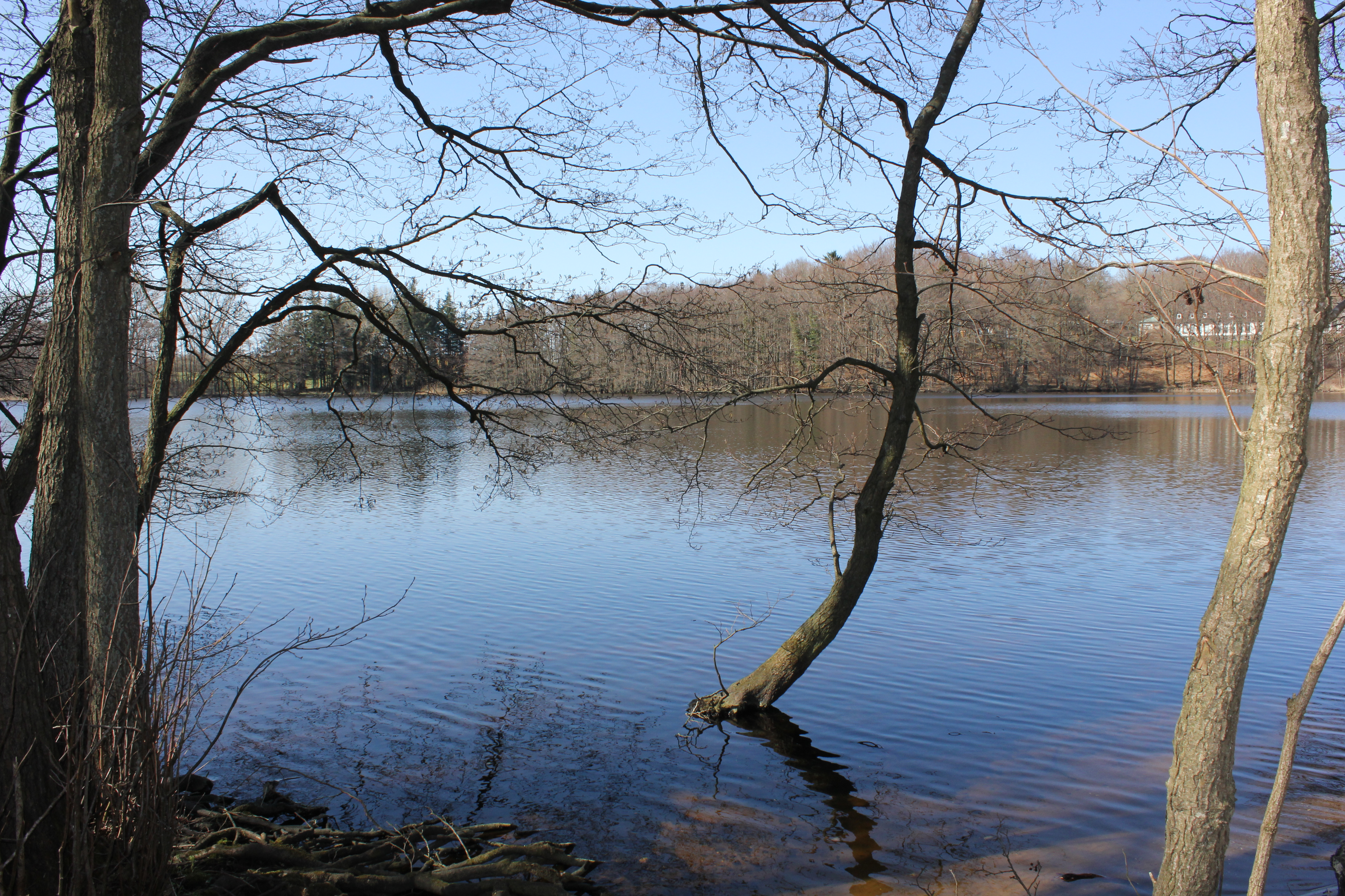 Sankelmarker See